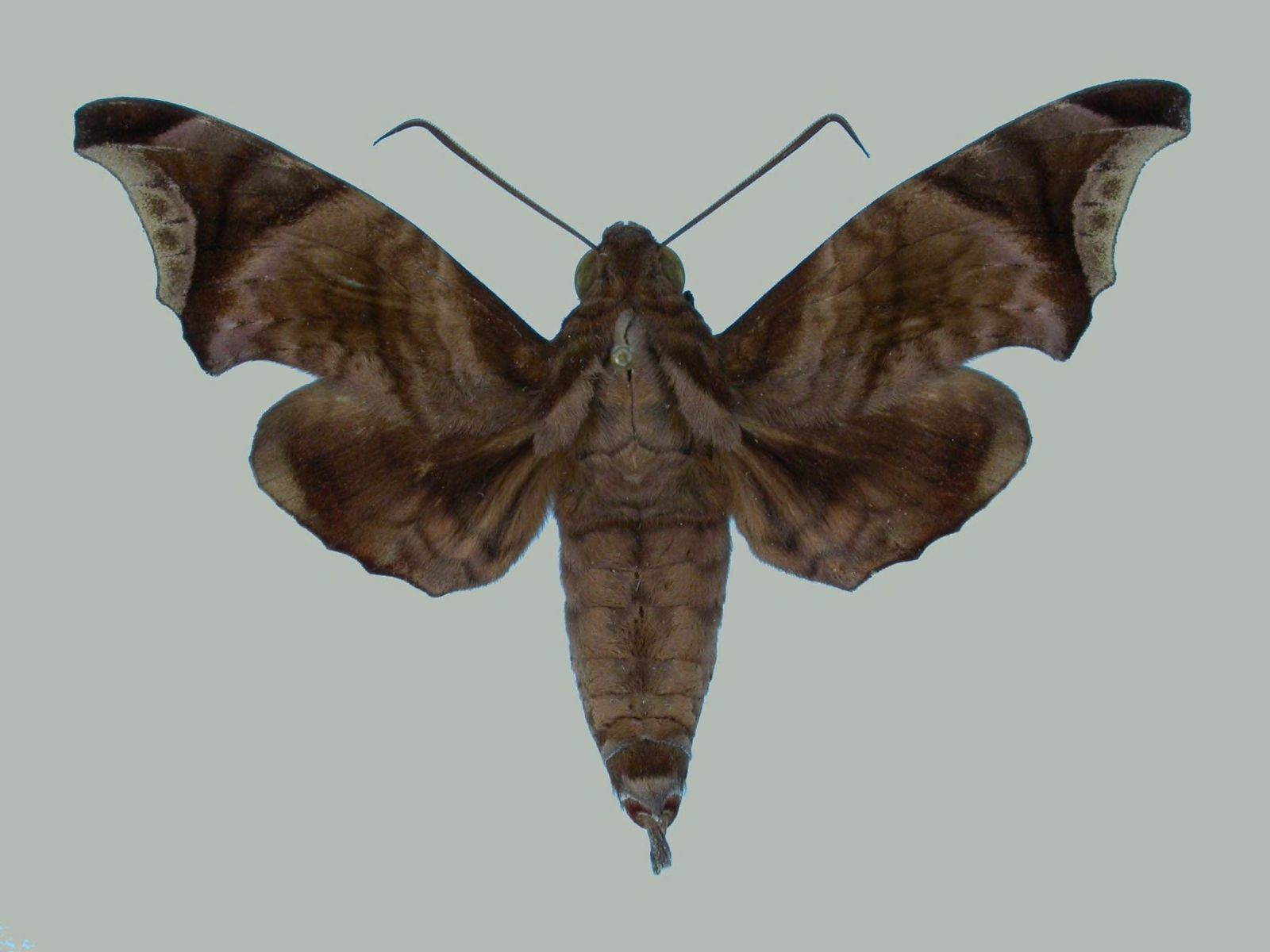 Enyo taedium taedium, male, upperside. Venezuela, Aragua, Rancho Grande